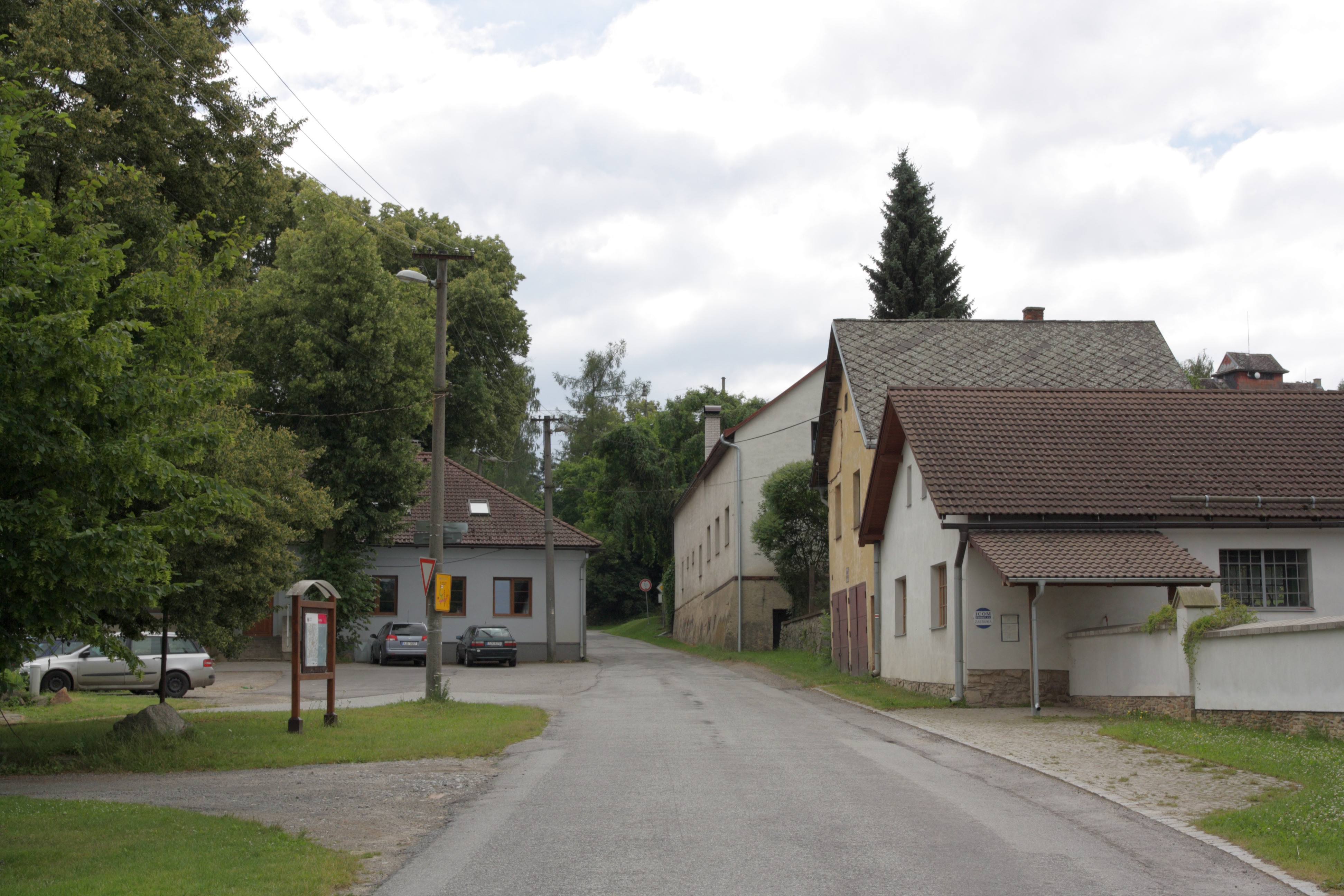 Rantířov - náves.